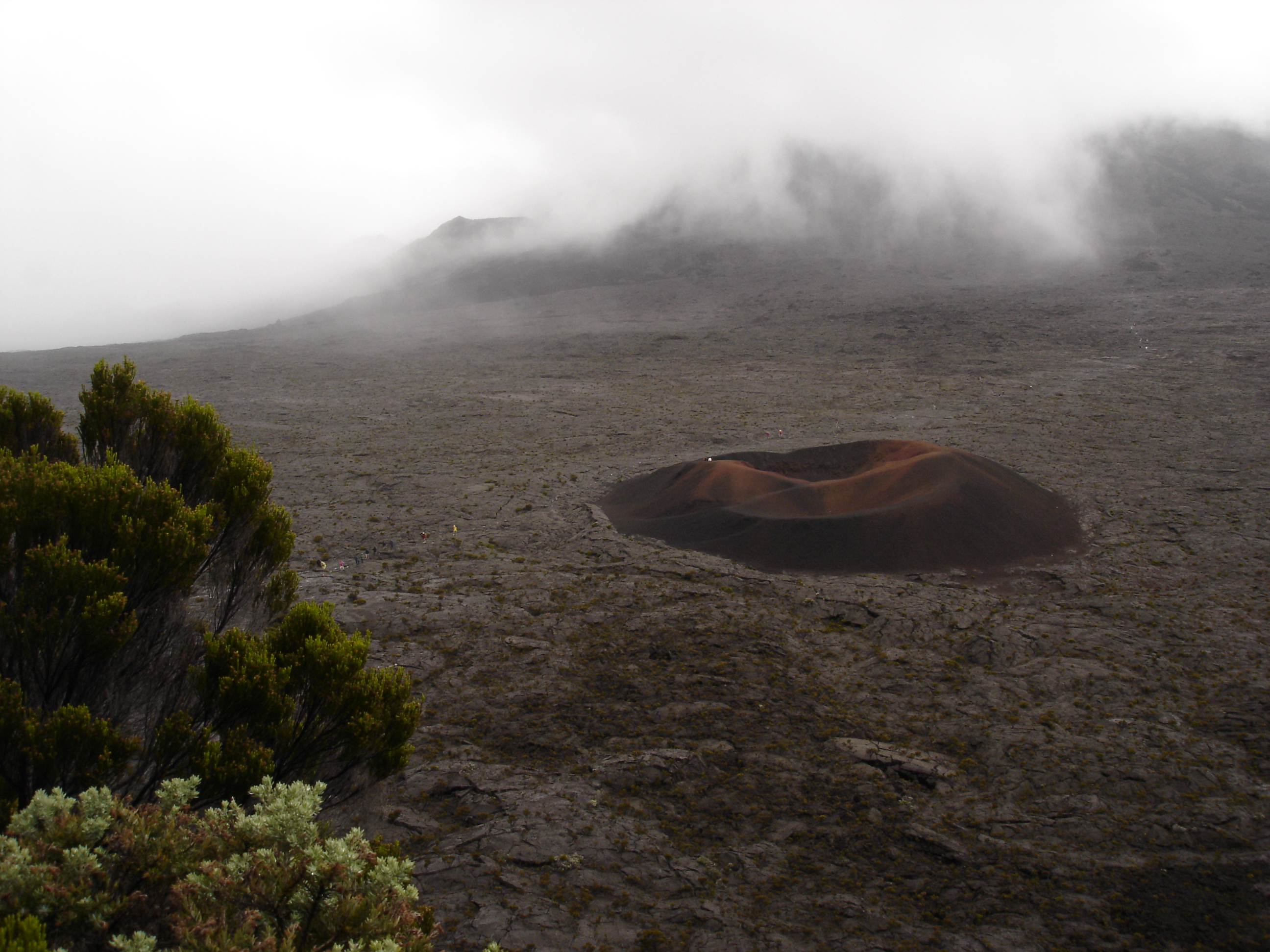 Description: Le Formica Leo dans l'Enclos Fouqué, novembre 2004, La Réunion Source: Bouba